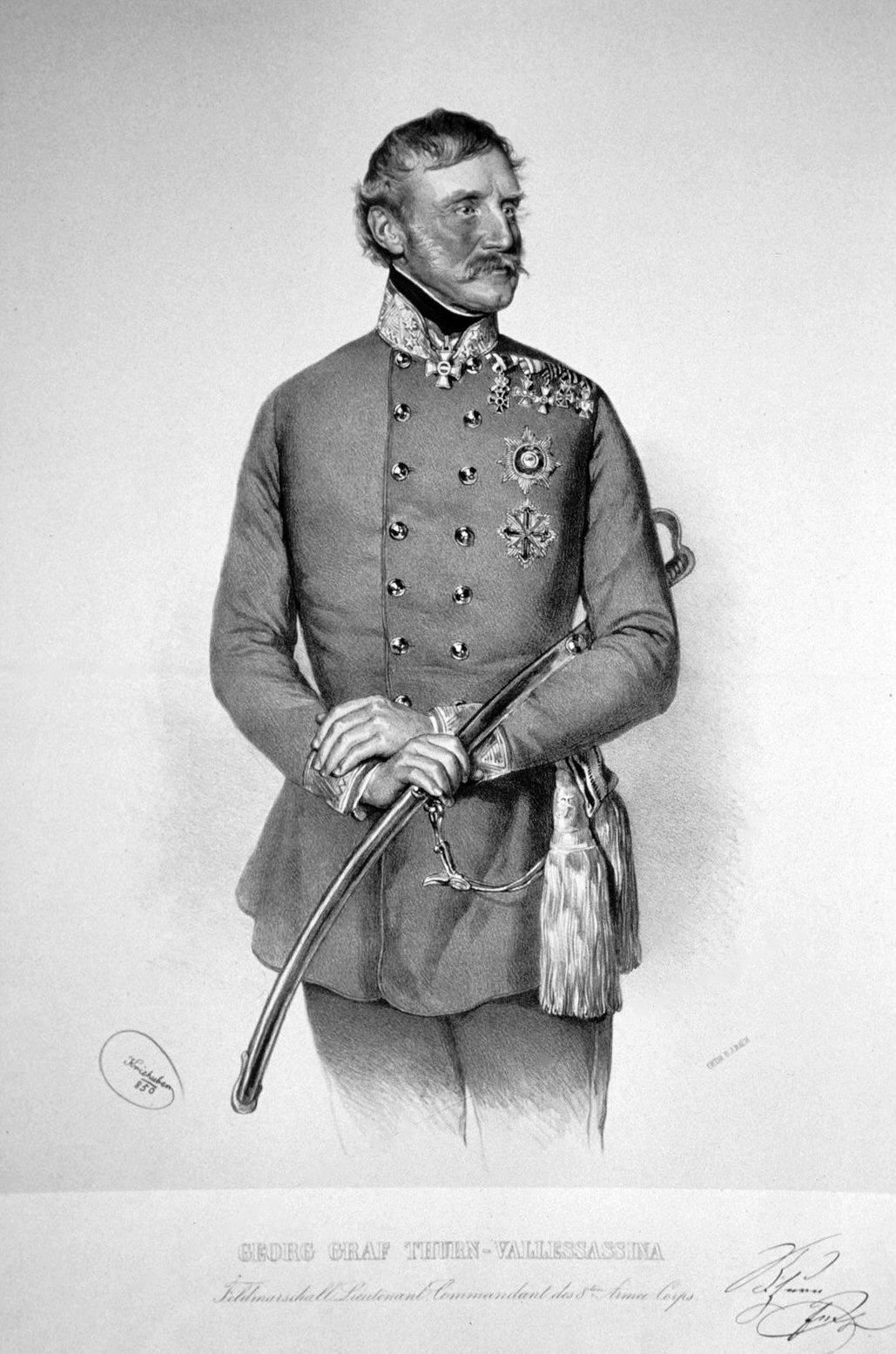 Georg Graf Thurn-Valsassina (1788-1866), k. k. Feldzeugmeister, Kommandeur des MAria-Theresien-Ordens, Großkreuz des Leopold-Ordens